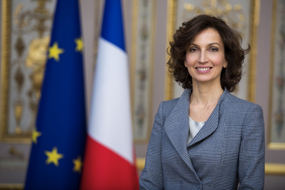 Audrey Azoulay, ministre de la Culture et de la Communication